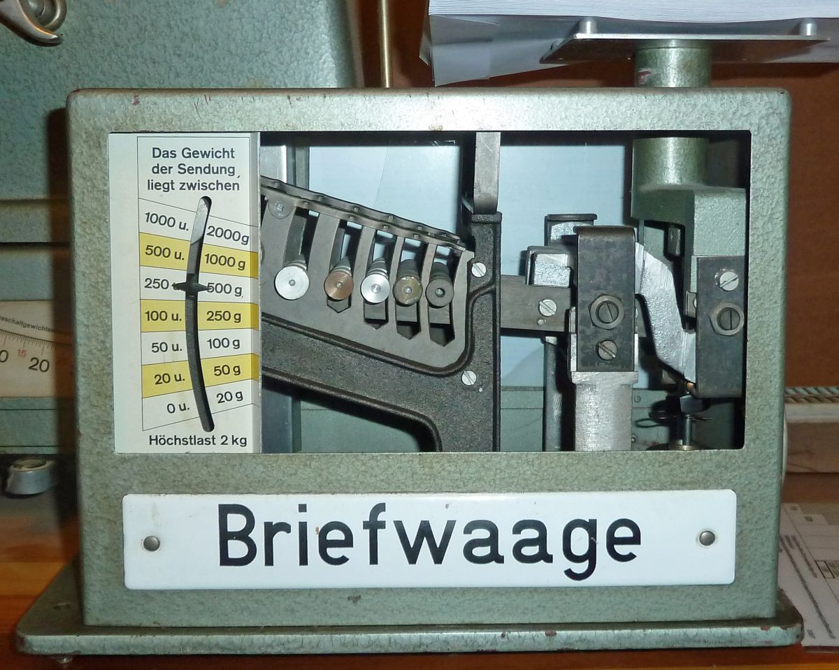 Entgeltbereichswaage/Hubgewichtswaage der Deutschen Bundespost mit Sicht auf das Innenleben.